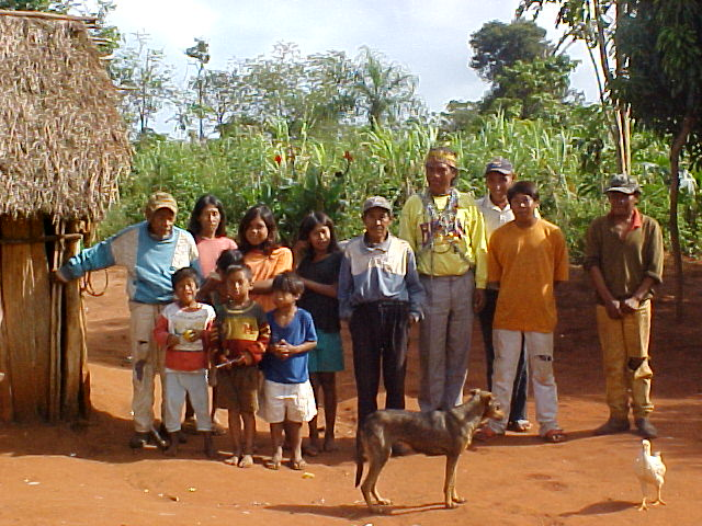 A Guarani Family From Mato Grosso do Sul, Brasil, 2004